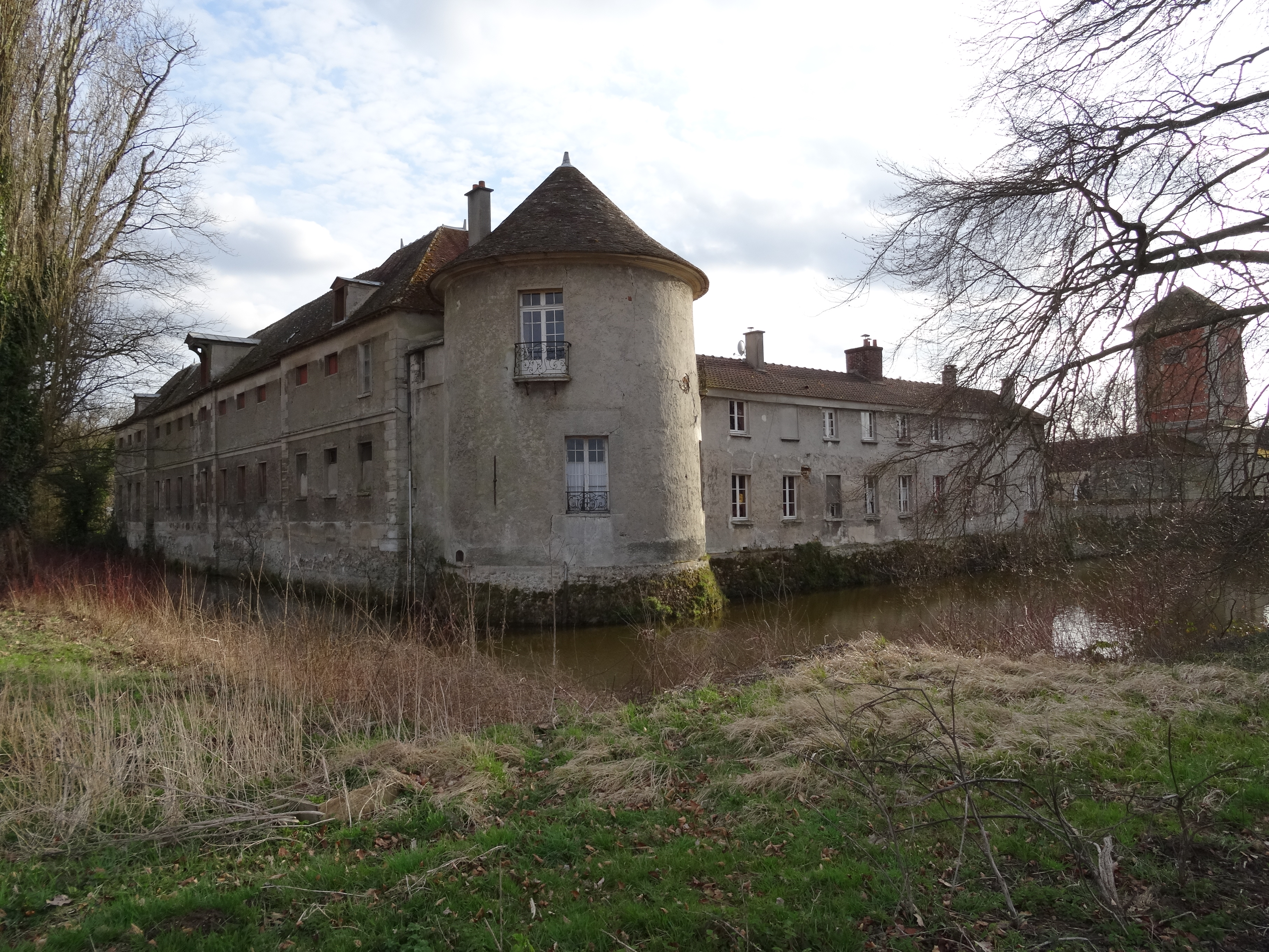 La ferme de Lamirault, communes de Croissy-Beaubourg et de Collégien. (Seine-et-Marne, région Île-de-France).